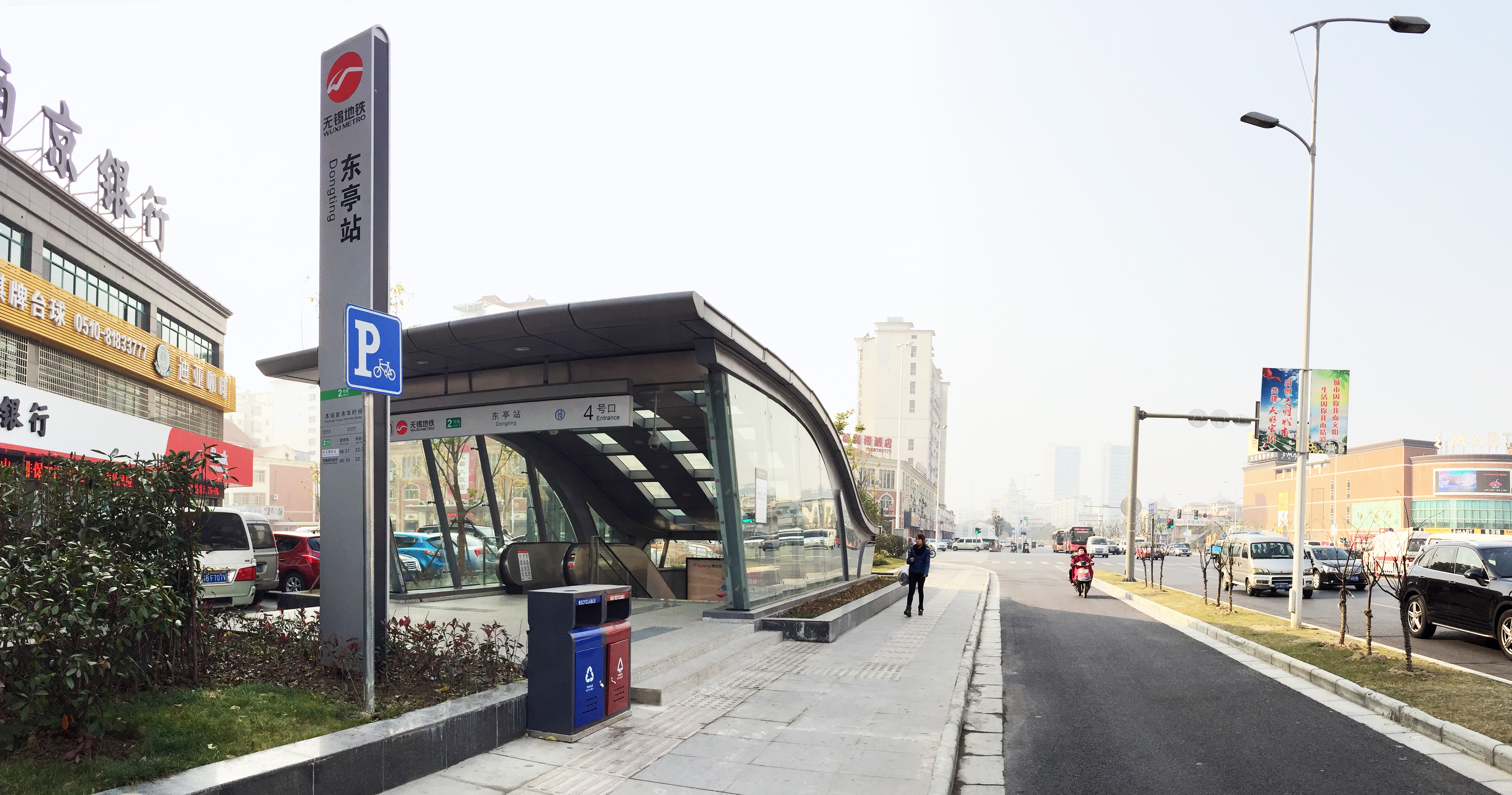 無錫地鐵東亭站4號出入口